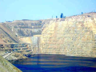 Berkeley Pit, mine in Butte, Montana in 1986.